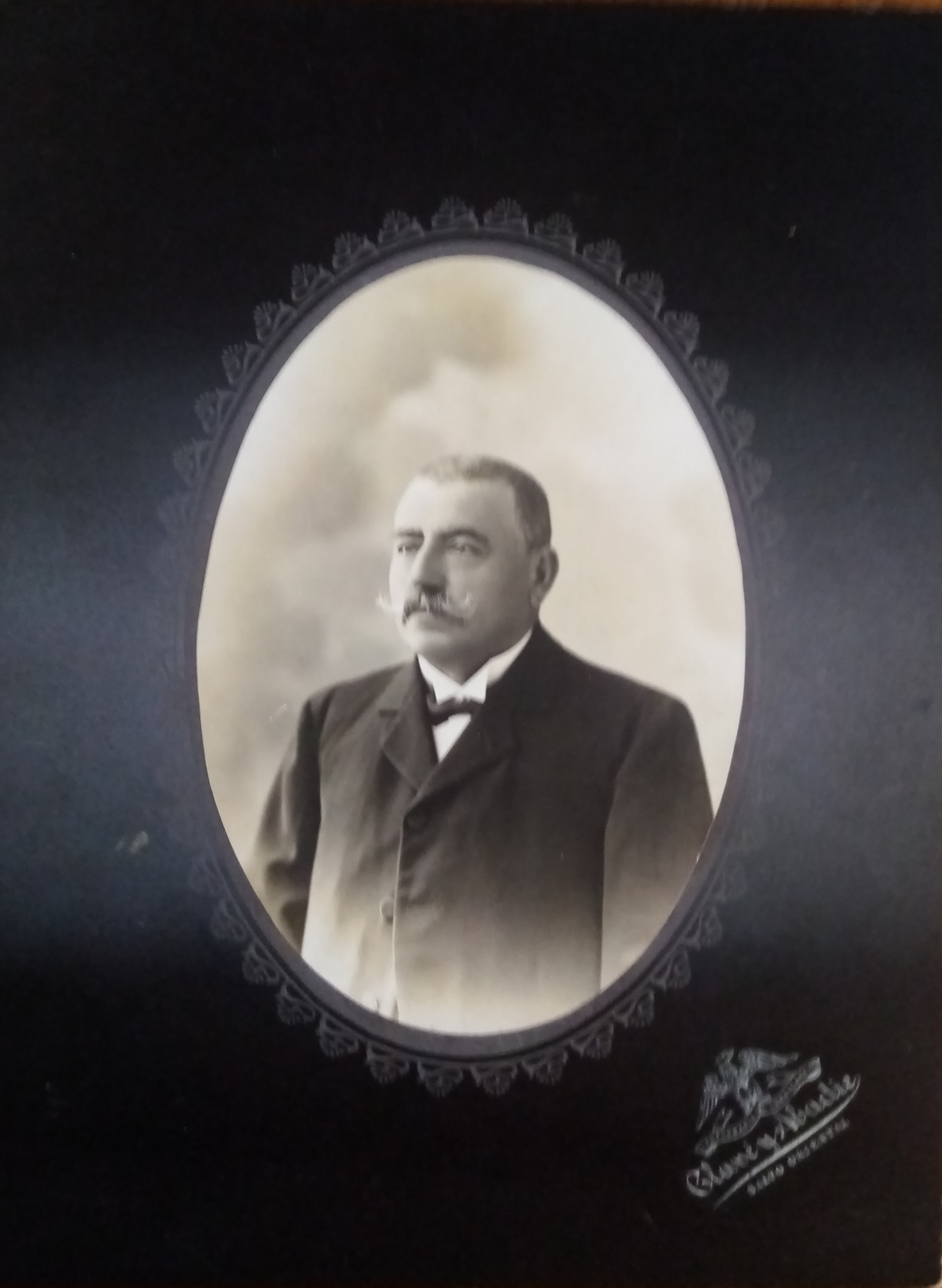 Carlo Maldini fondatore del villaggio di Palomas in Uruguay